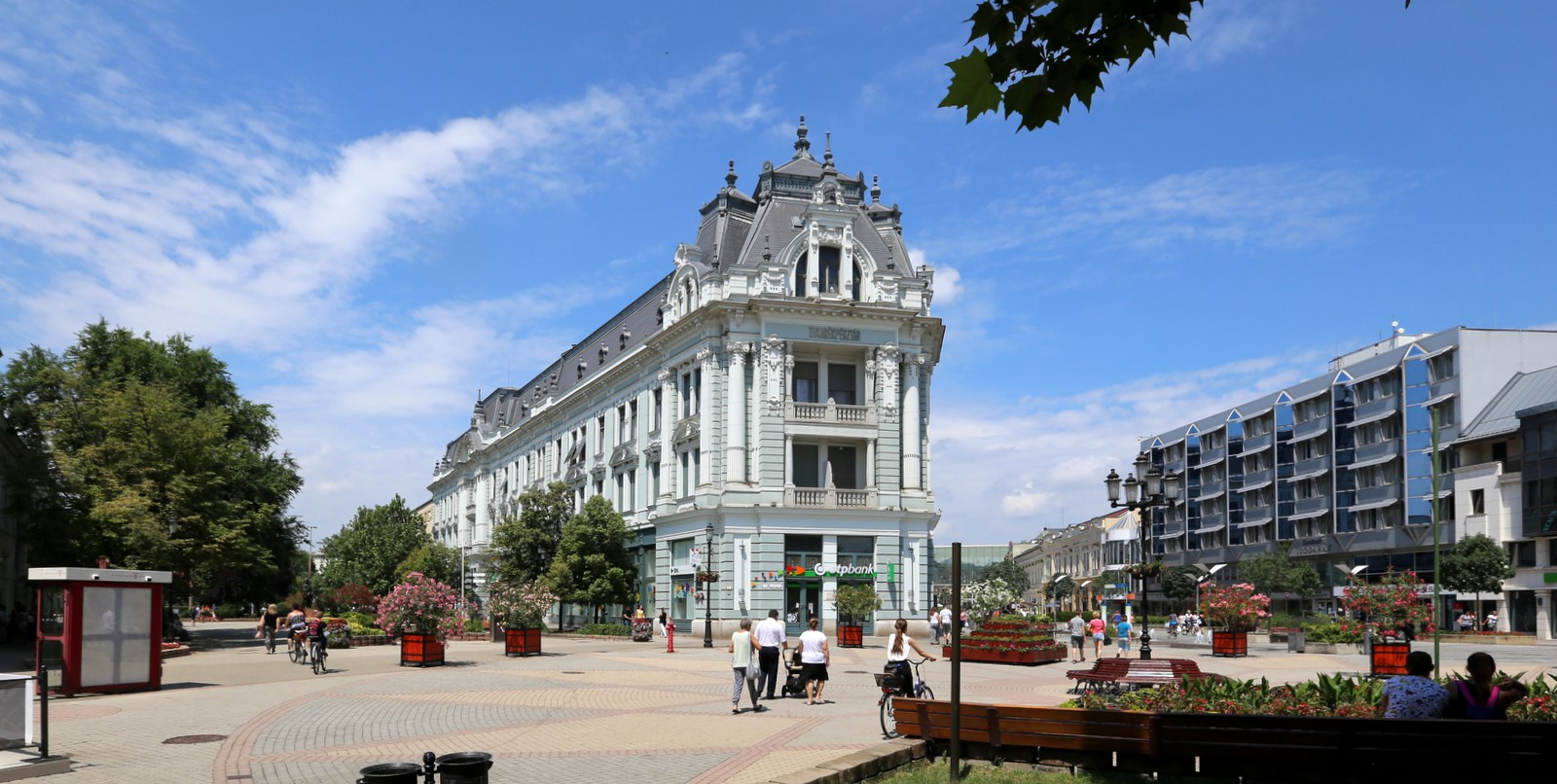 Nyíregyháza, Takarékpénztár-ház (OTP)